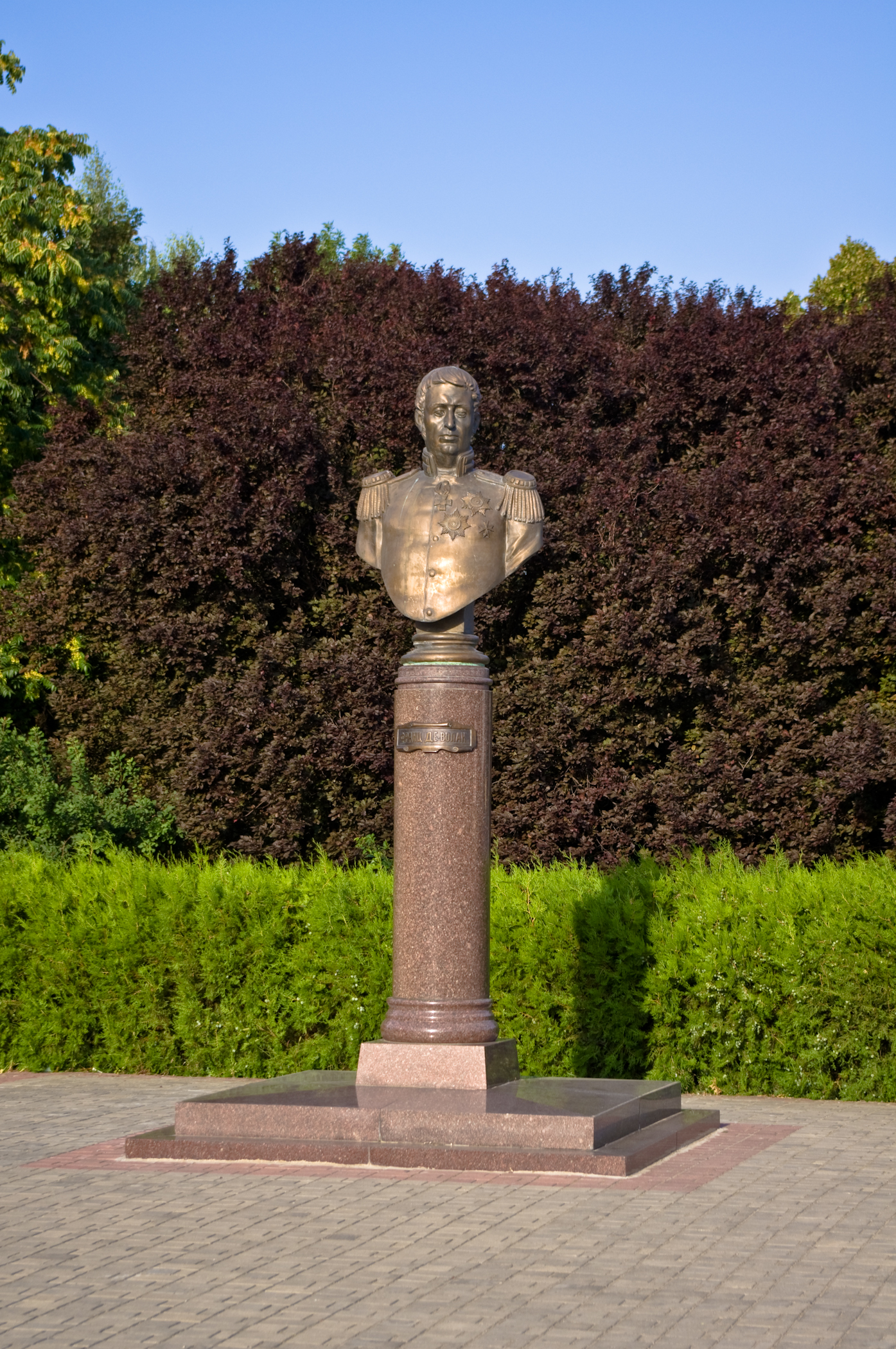 Памятник Францу де Волану в Тирасполе на площади Суворова